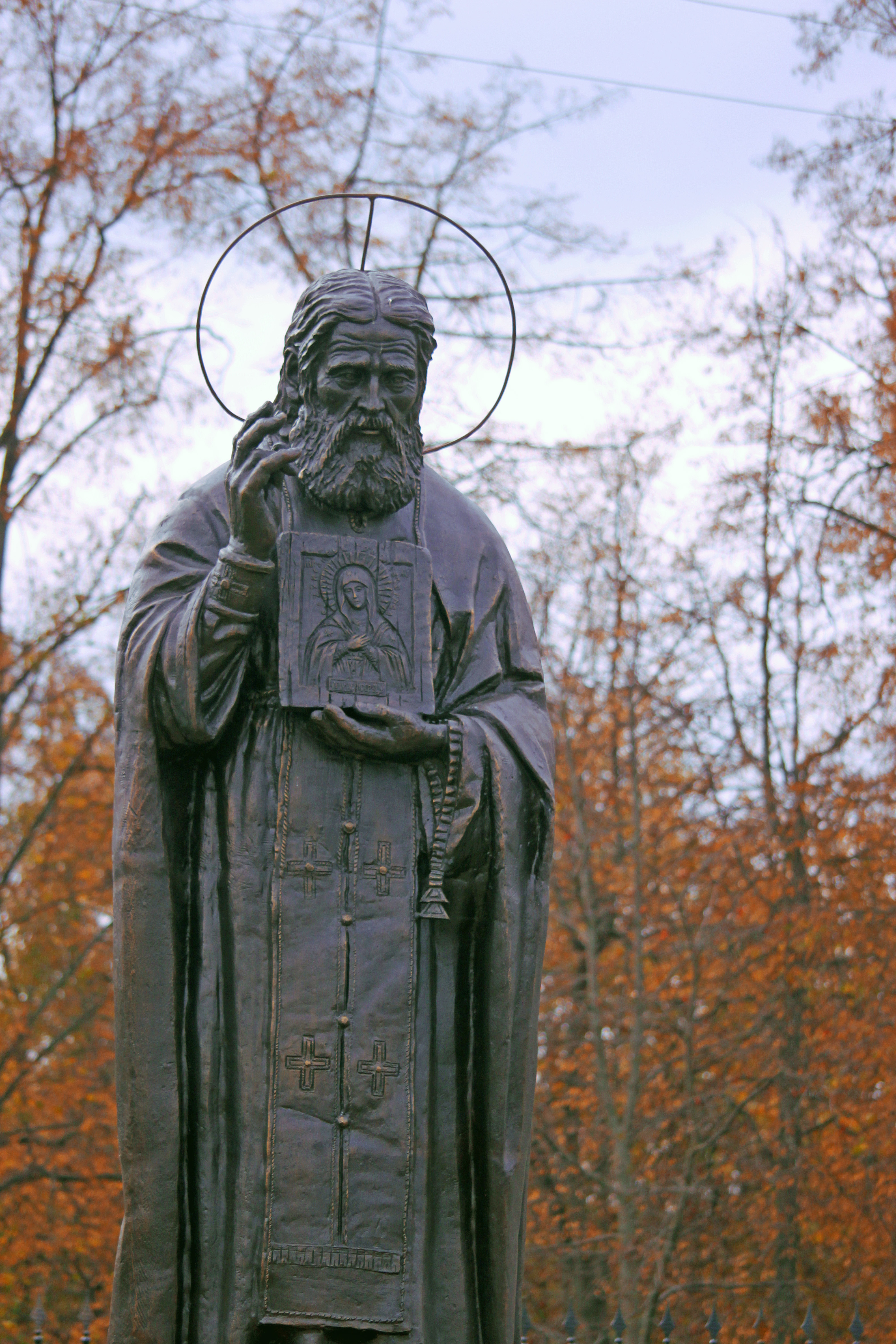 бронзовая скульптура в г. Орёл. скульптор Андрей Следков